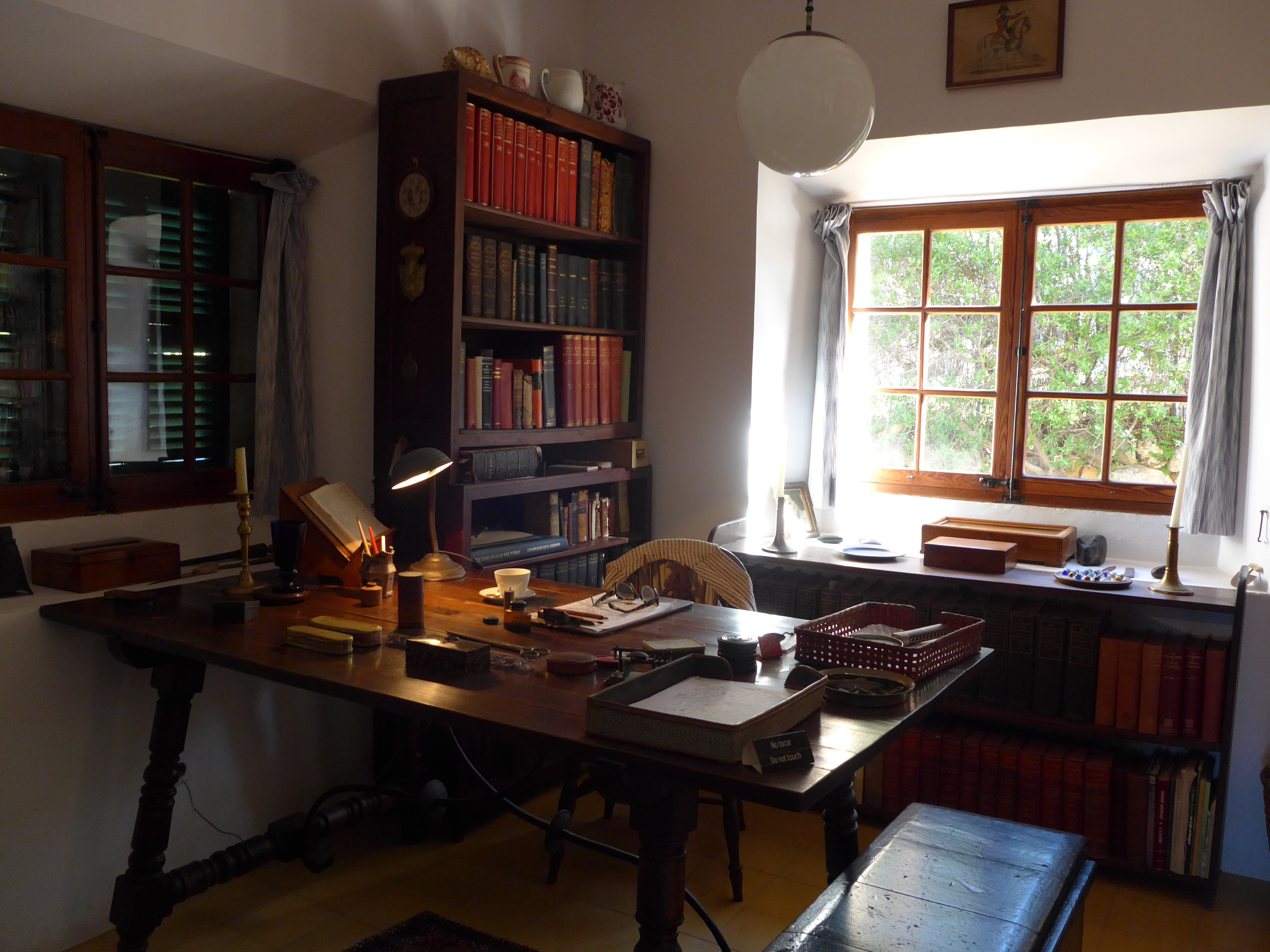 Estudio del escritor Robert Graves (1895-1985) en su casa de Deià (Mallorca, España)